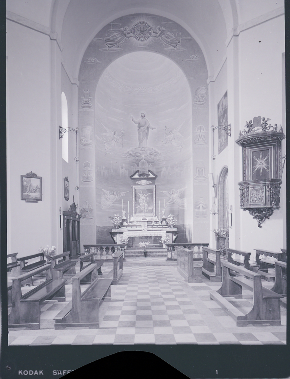 Servizio fotografico : Como, 1963 / Paolo Monti. - Buste: 5, Fototipi: 5 : Negativo b/n, gelatina bromuro d'argento/ pellicola ; 10x12. - ((Serie costituita da 5 buste sciolte di negativi identificati con una doppia numerazione (da 46016 e 46020): 25345, 25346, 25347, 25348, 25349. - La doppia numerazione potrebbe corrispondere ai lavori realizzati durante il periodo di attività del laboratorio e studio fotografico "Foto Studio 22", società che risulta essere stata aperta il 10/04/1961, con partecipazione, nel ruolo di gerente, di Vincenzo Carrese. - La suddetta serie è contenuta nella scatola G25201-25400, formato 18x24. - Fonte: Rubrica di Paolo Monti: Archivio fino 1-4-1961/ 31-3-1963 (1961-1963), presso Archivio Paolo Monti